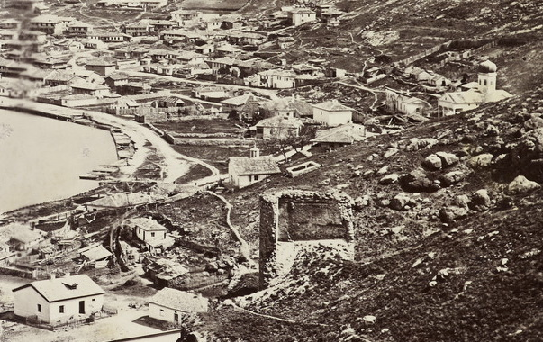 Храм Двенадцати Апостолов (Балаклава) 1869 фрагмент британского фото Description Photograph of Balaklava Bay. The town is built on the curve of the estuary to the right. The Prince and Princess of Wales, later King Edward VII and Queen Alexandra, visited the Crimea in 1869 as part of a tour of the East. It is likely that this set of photographs were collected during or just after the tour. Provenance Acquired by the Prince of Wales, later King Edward VII, c.1869